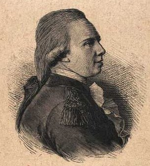 Hans Christian Sneedorff (1759-1824), dansk søofficer